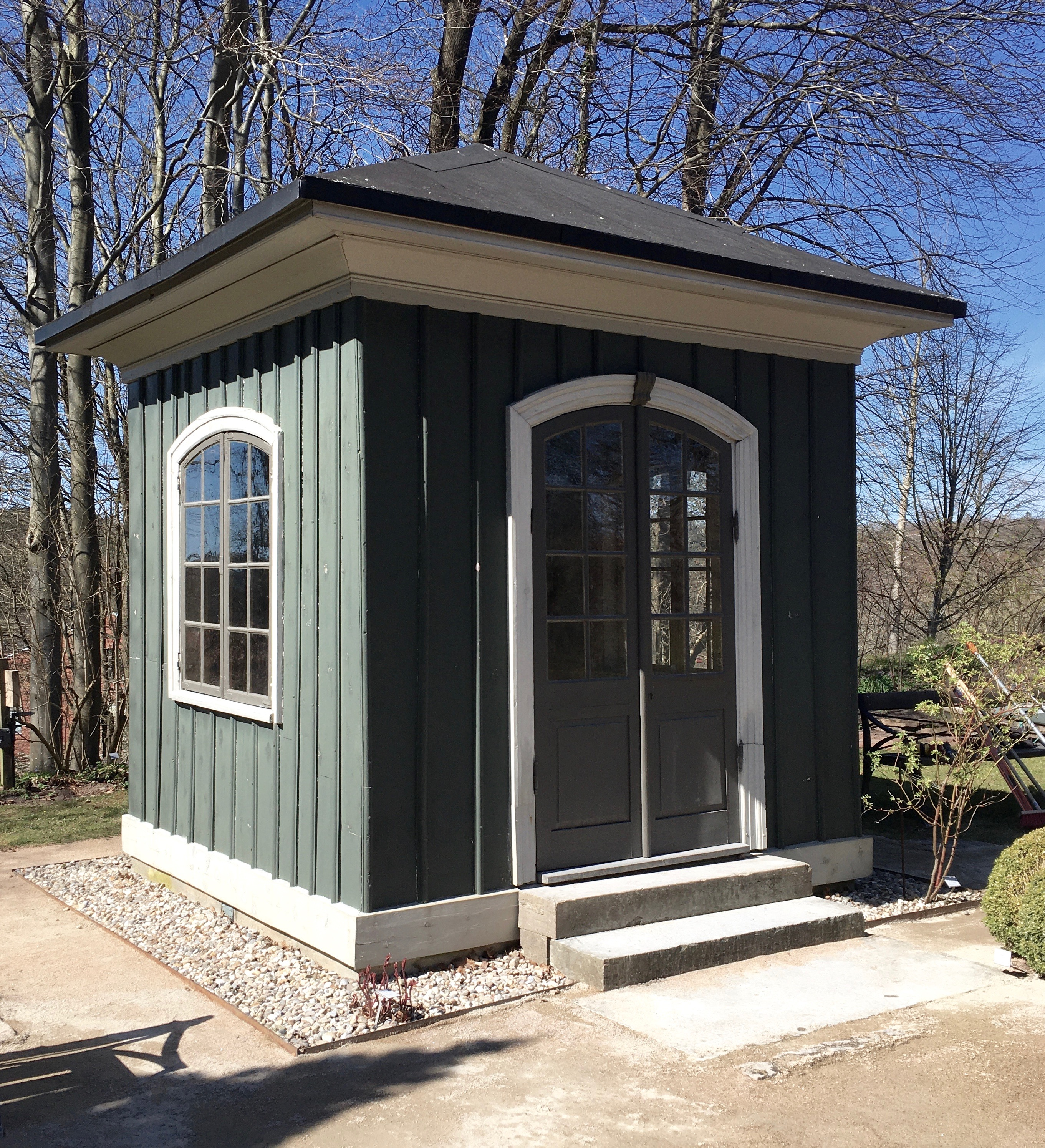 Carlbergs lusthus från Kärralunds gård i Göteborg.